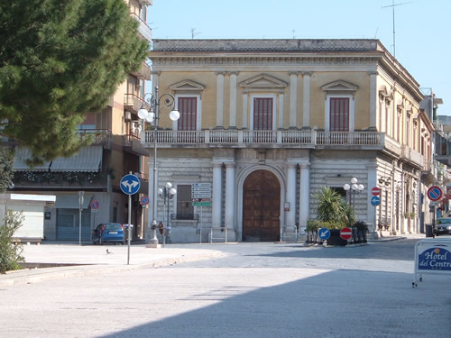 Palazzo Fracchiolla-Minerva nel 2007